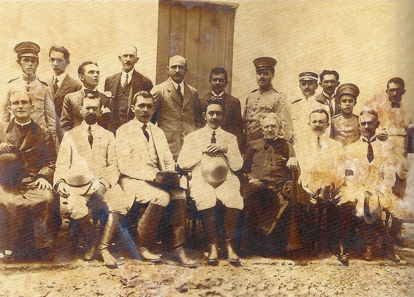 Visita do Presidente do Estado do Ceará, Dr. João Thomé de Saboia e Silva. Fotografia P&B (12 x 17 cm) tomada em Juazeiro do Norte, em 05/12/1917. Acervo do Museu do Ceará - Fortaleza, CE, Brasil. Da esquerda para a direita, sentados: monsenhor Vicente Salazar da Cunha, Tácito Teophilo Gaspar de Oliveira, coronel José Saboia (chefe político de Sobral), Padre Cícero, Antonio Fiúza Pequeno e Manuel do Nascimento Fernandes Távora; da esquerda para a direita, em pé: Adauto Fernandes, não identificado, Luiz Batista Viana, conde Adolfo Achille van de Breule, Henrique Eduardo Couto Fernandes, Floro Bartholomeu da Costa, Leonardo Ferreira Mota, Arnaldo Pacheco, coronel Filemon Teles (chefe político de Crato), José Tomé de Saboia e Teodoro Nunes Vieira.